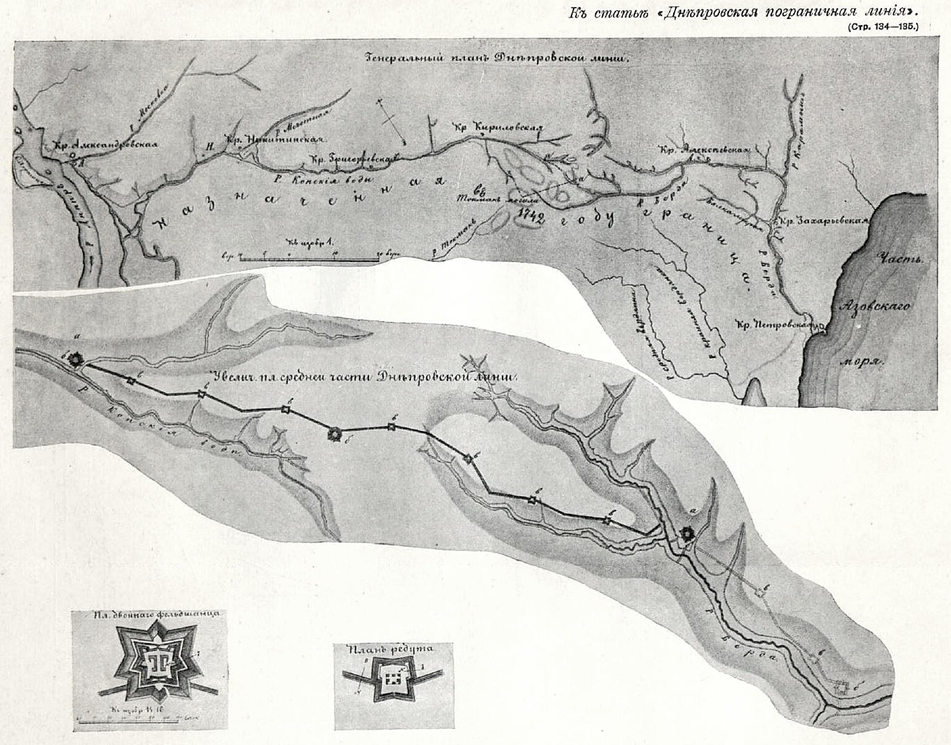 Это изображение было использовано для иллюстрирования статьи «Днепровская пограничная линия» опубликованной в девятом томе «Военной энциклопедии», который был издан книгоиздательским товариществом И. Д. Сытина в 1912 году в столице Российской империи городе Санкт-Петербурге.